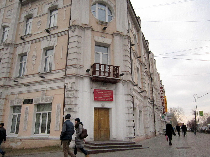 Корпус № 3 Бурятского госуниверситета, факультет иностранных языков.